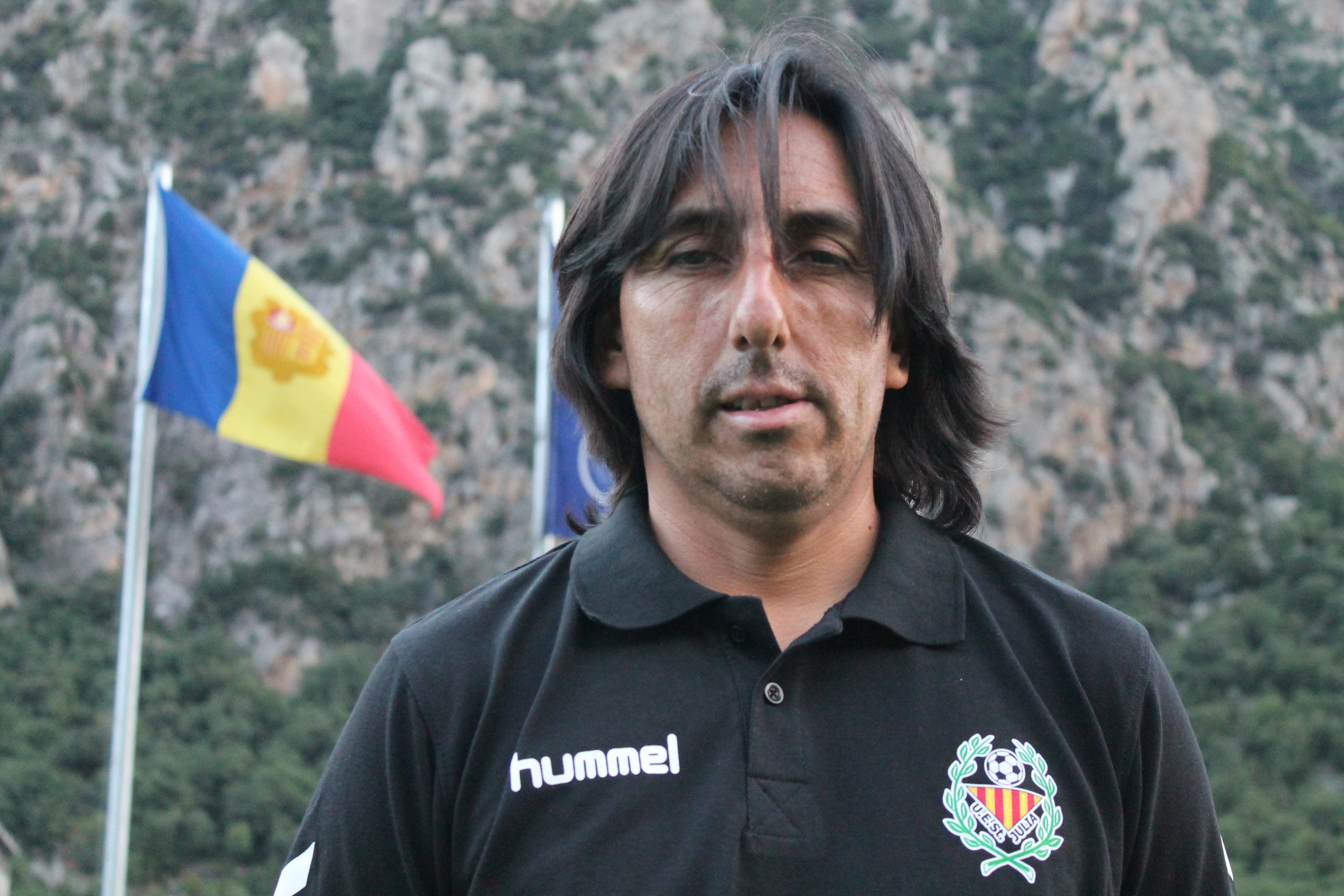 Guillermo Burgos